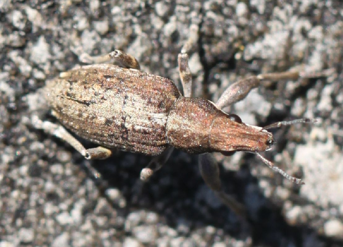 Rüsselkäfer Charagmus griseus am 7. April 2018 in der Schwetzinger Hardt